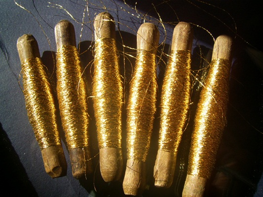 نخ گلابتون